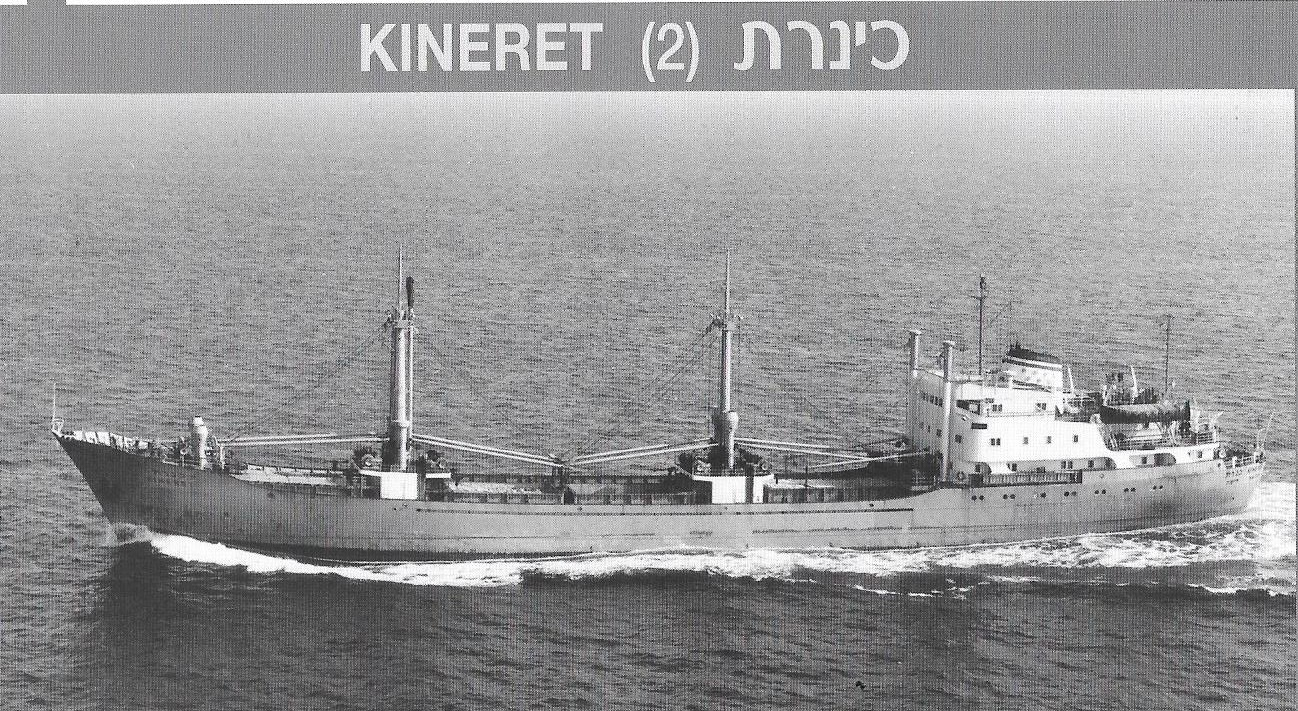 אוניית המשא 'כנרת' בה שימש מריאנסקי כקצין שני , 1964